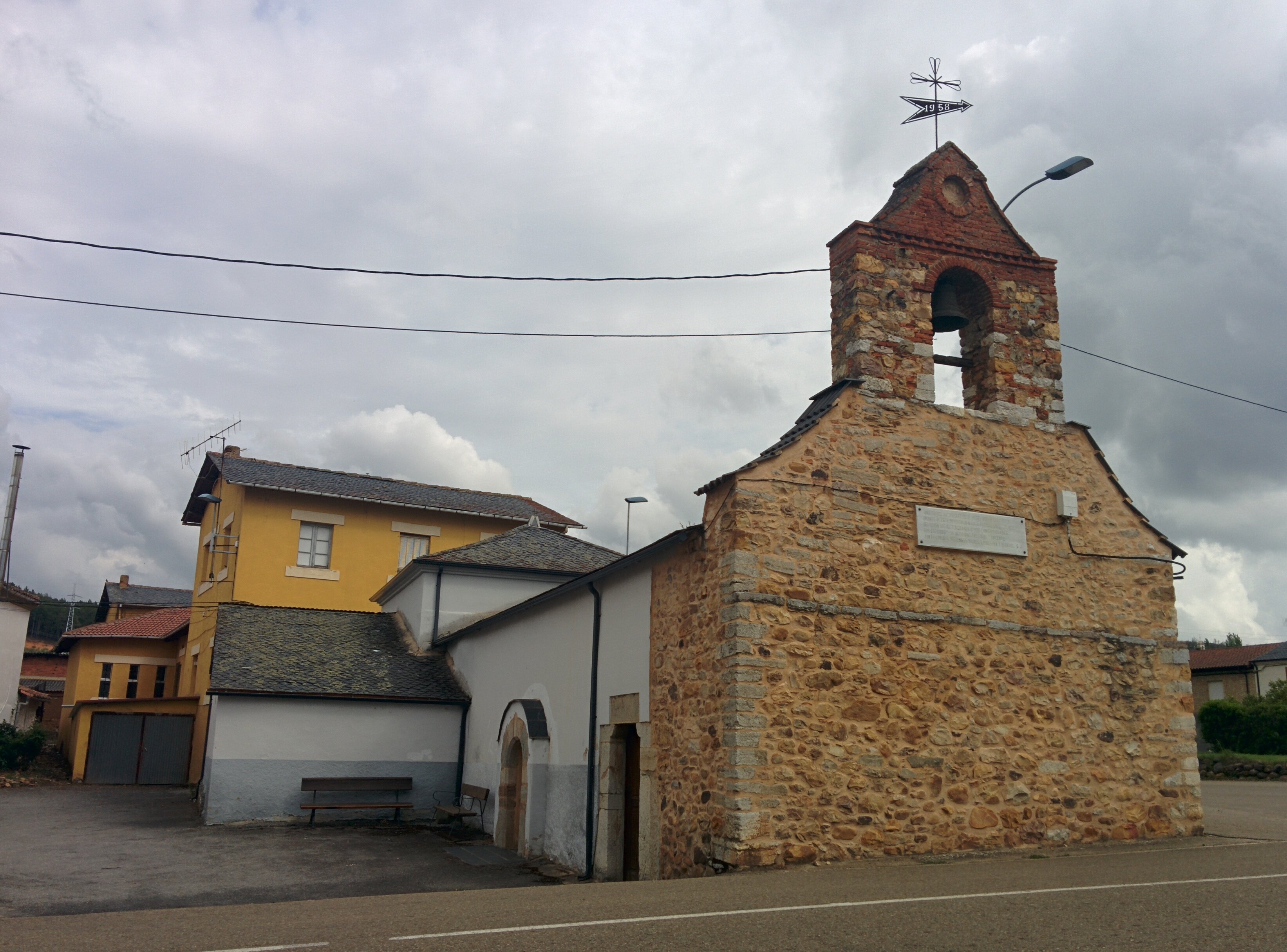 Ermita de Rioseco de Tapia (León, España).